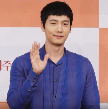 MBC 주말특별기획 '황금정원' 제작발표회가 19일 오후 서울 마포구 상암동 MBC 사옥에서 열렸다.